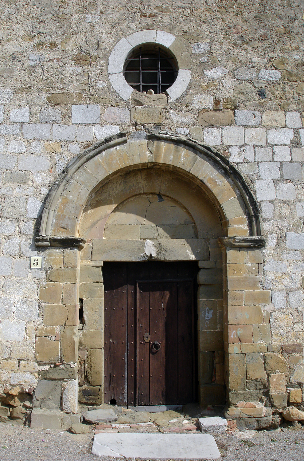 Esglèsia de Sant Esteve de Maranyà (Girona, Catalunya, Espanya)